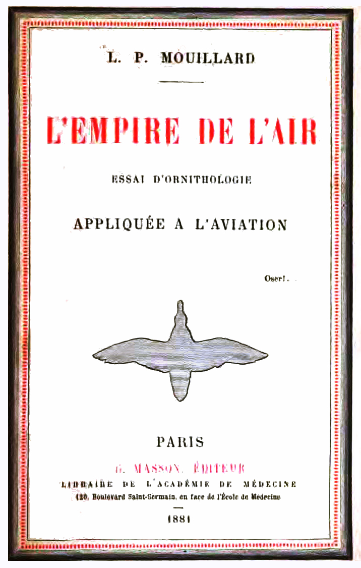 Louis Pierre Mouillard book cover of L'Empire de l'Air